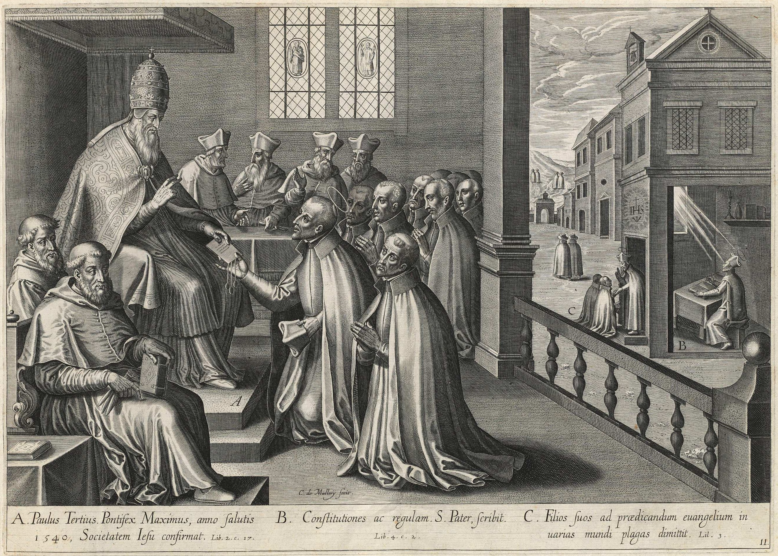 Karel van Mallery: Confirmación por el papa Paulo III de la Compañía de Jesús. Grabado de la serie "Vita Beati Patris Ignatii Loyolae Religionis Societatis Iesv fvndatoris ad vivum expressa... de Pedro de Ribadeneira, Amberes, 1610. Estampas firmadas por Cornelis y Theodor Galle, Adriaen y Jan Collaert y Karel van Mallery por composiciones de Juan de Mesa. Biblioteca Nacional de España.